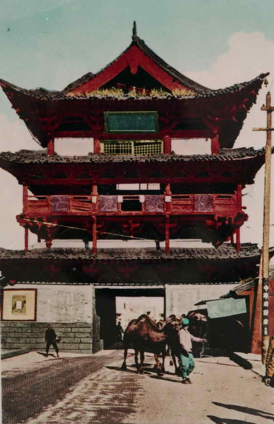 大同钟楼，今已不存